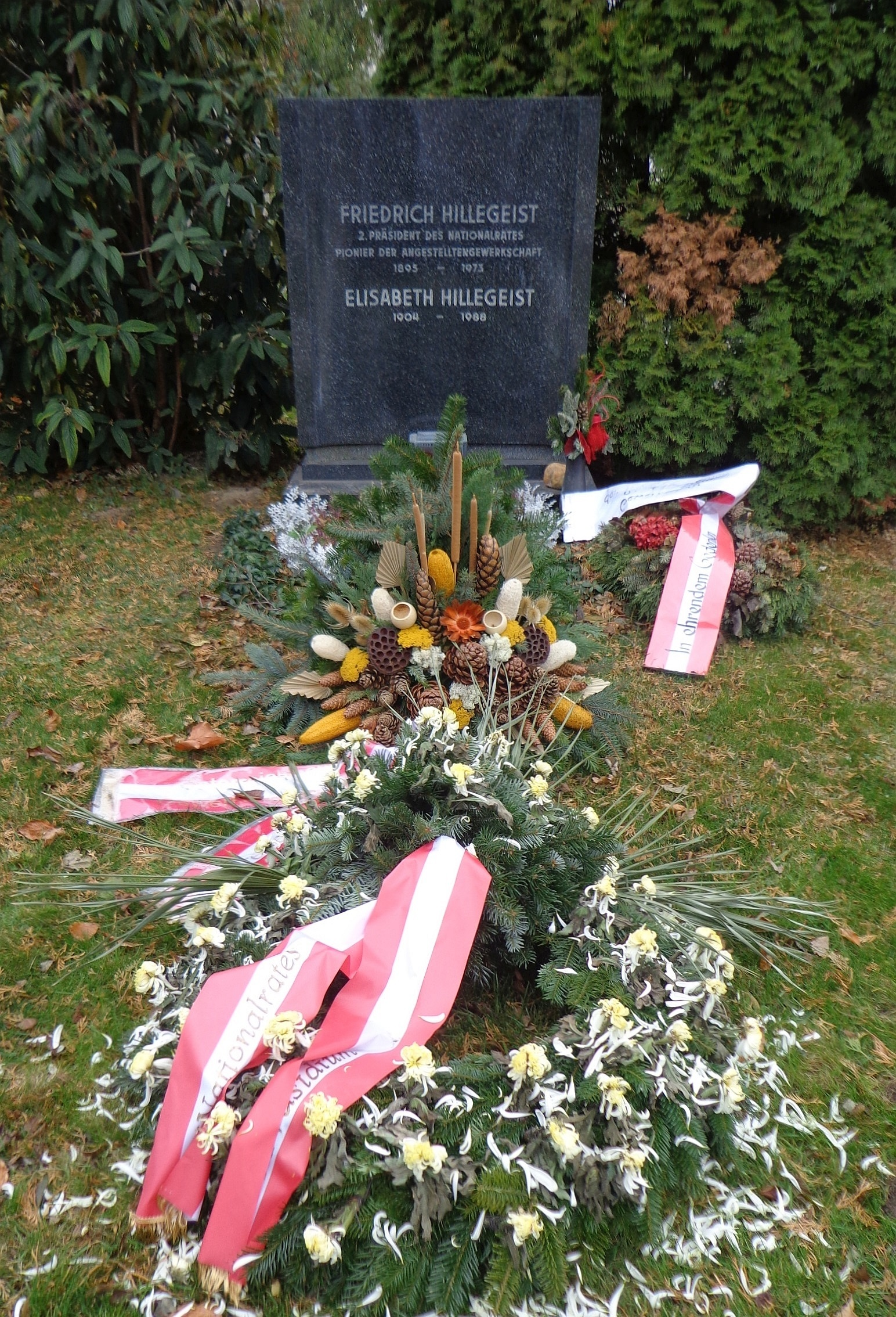 Wiener Zentralfriedhof - Gruppe 14 C, Ehrengrab von Friedrich Hillegeist